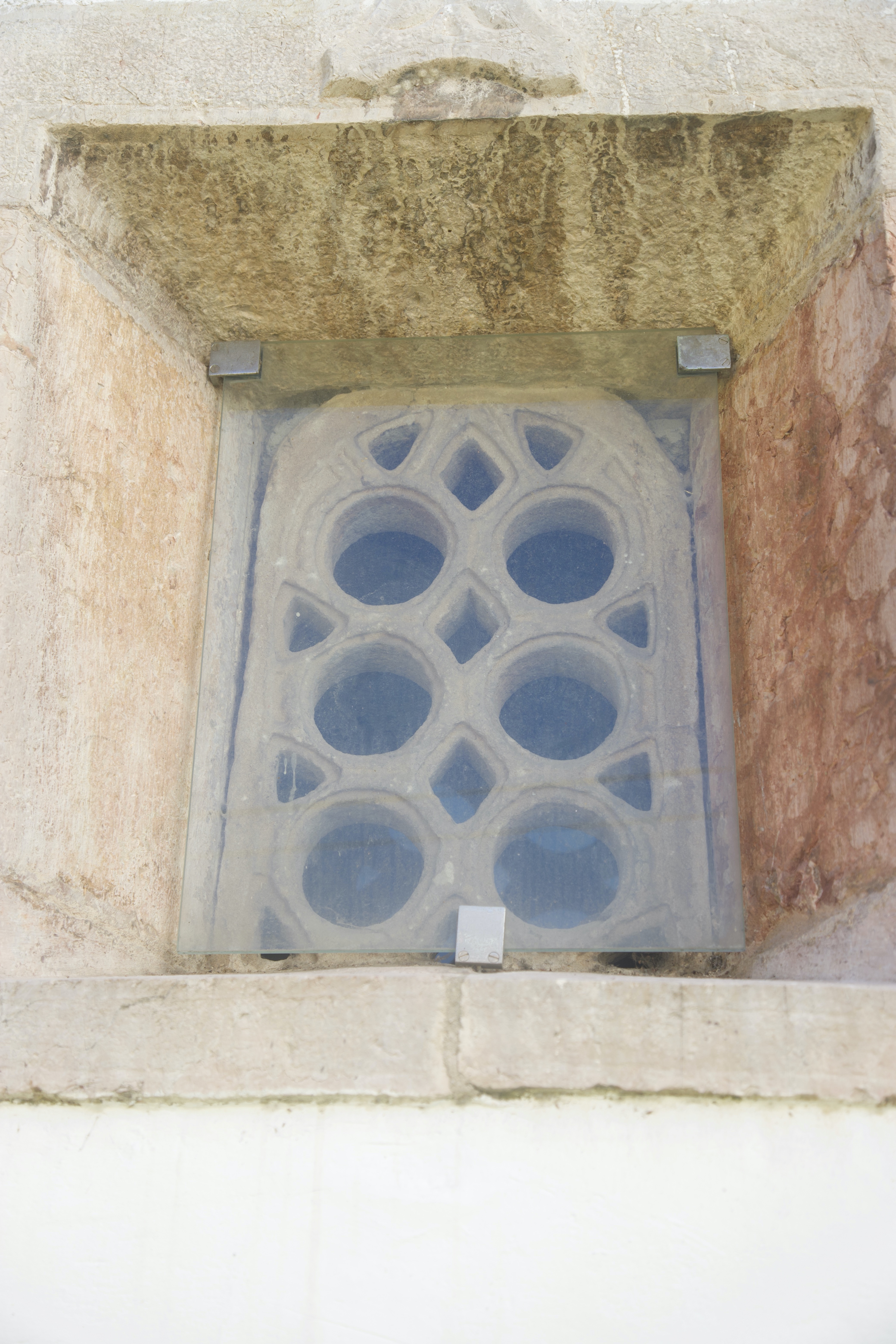 Celosía prerrománica de la igleisia de Santa Eulalina (Morcín). Vestigio prerrománico de la iglesia fundacional del siglo IX ó X